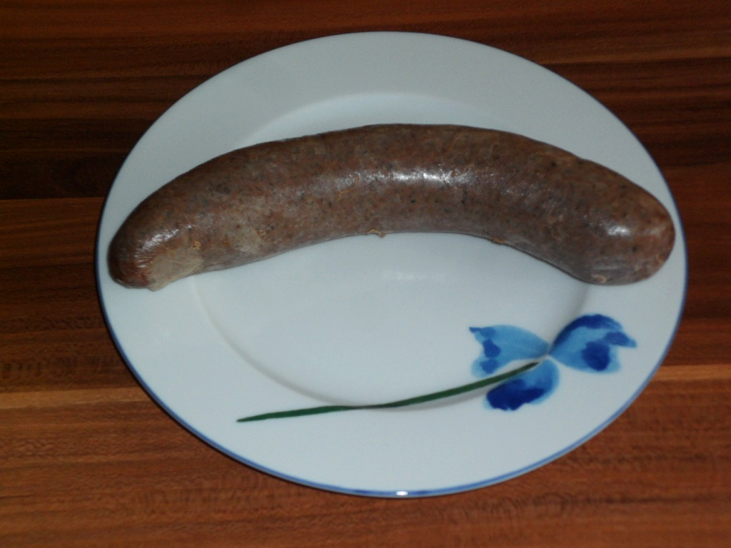 Schläsch: Schläsche Graupawurscht (aeberschläsch: Krupniok) ies anne traditionelle Blutwurscht-Variante aus der Schläsing.